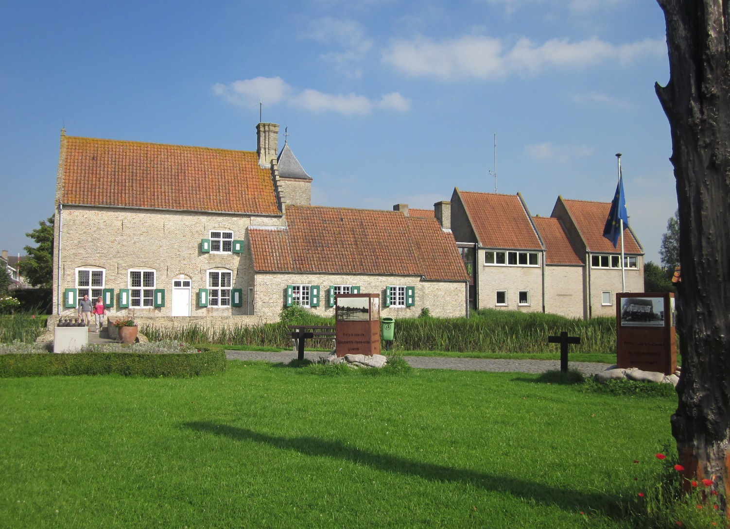 Hof van Wyckhuize, gemeentehuis van Alveringem, Sint-Rijkersstraat 19